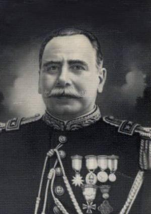 El general Enrique Luzuriaga en sus ultimos años